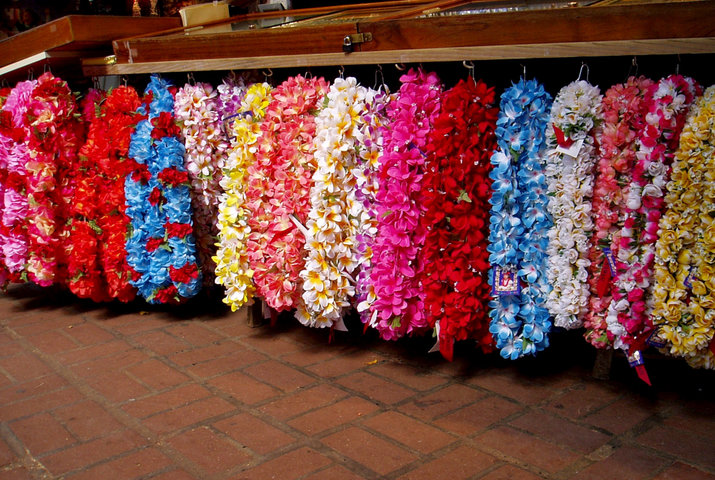 leis